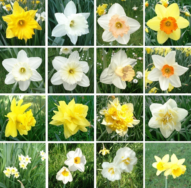 15 verschiedene Sorten von Narzissen